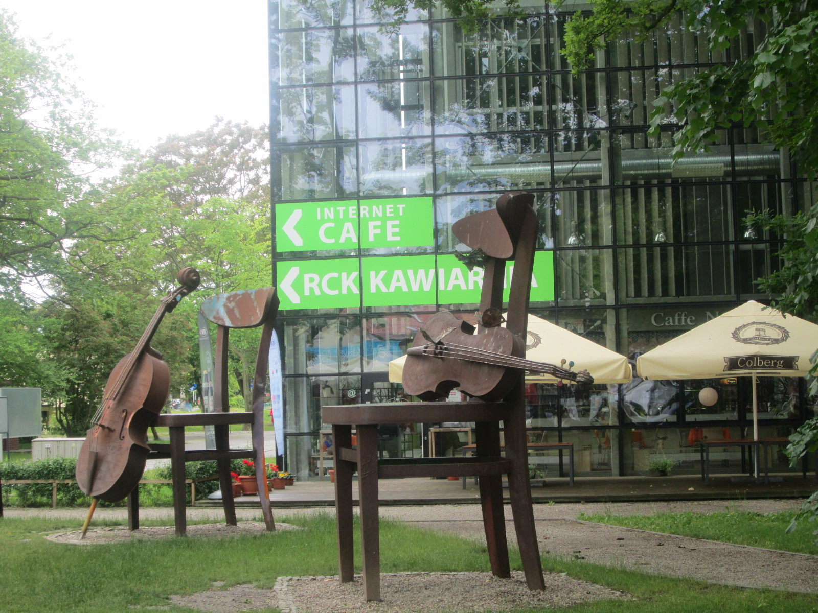 Regionales Kulturzentrum der Stadt Kołobrzeg